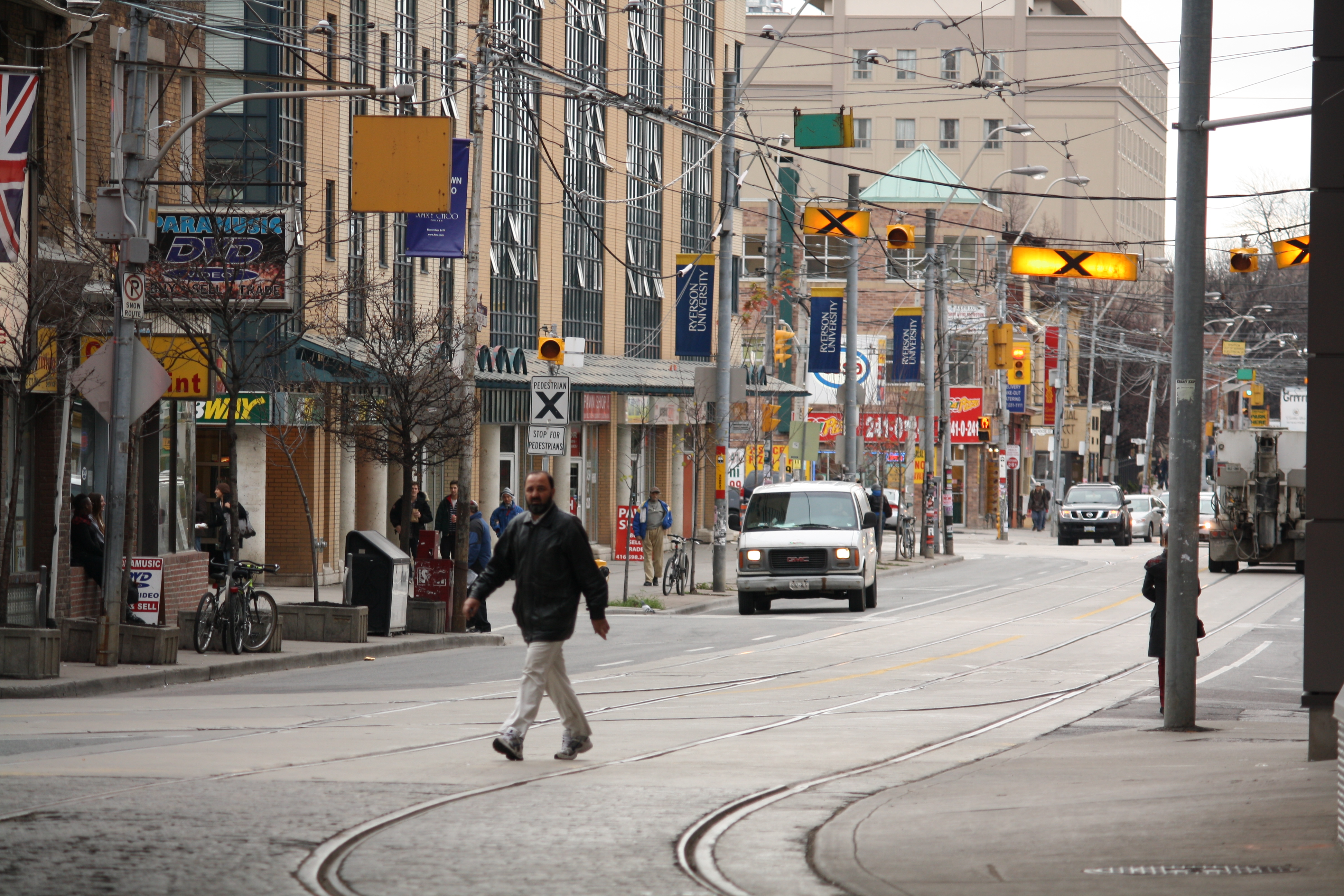 Dundas Street East